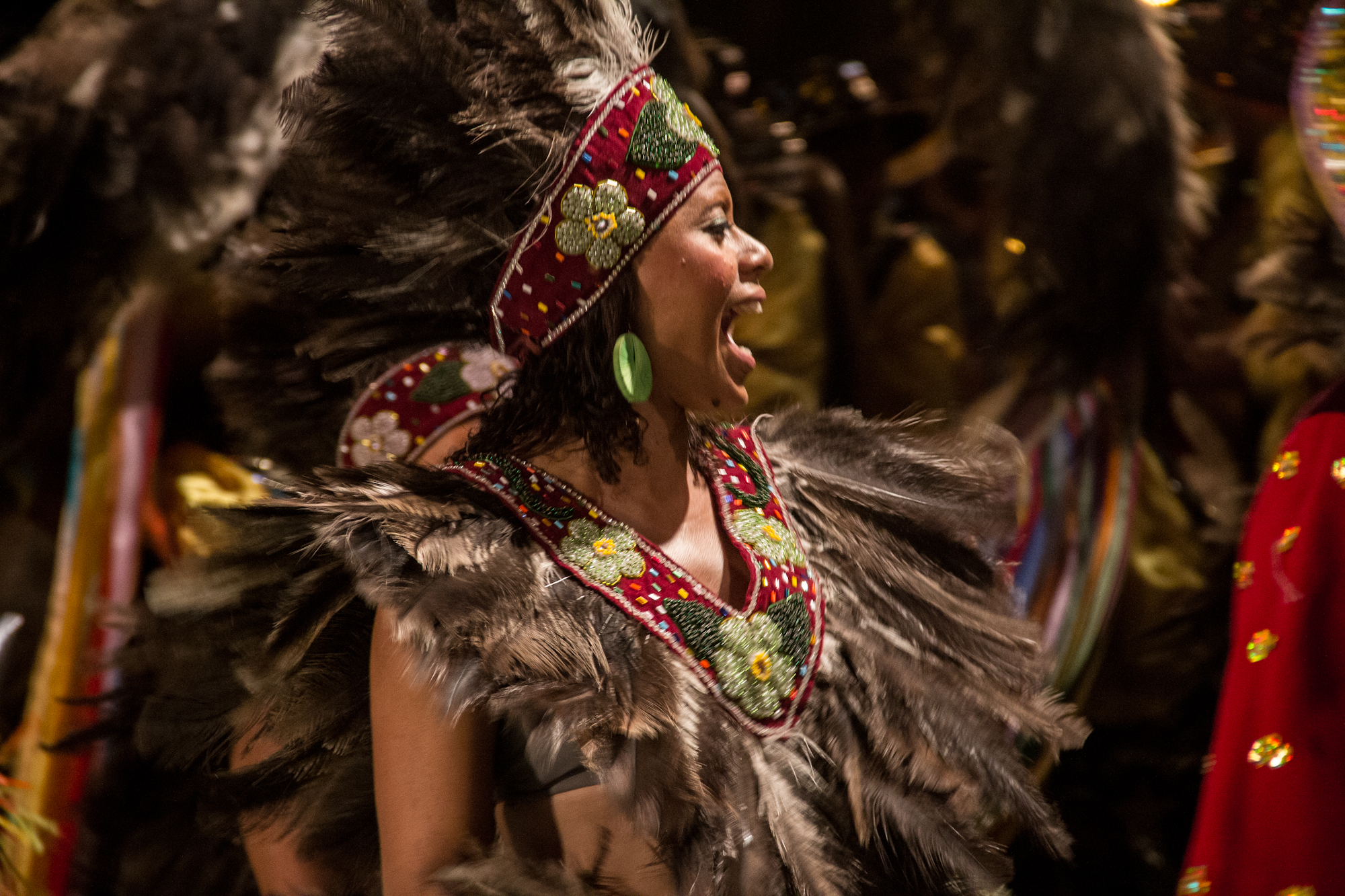 Foto: Emília Silberstein